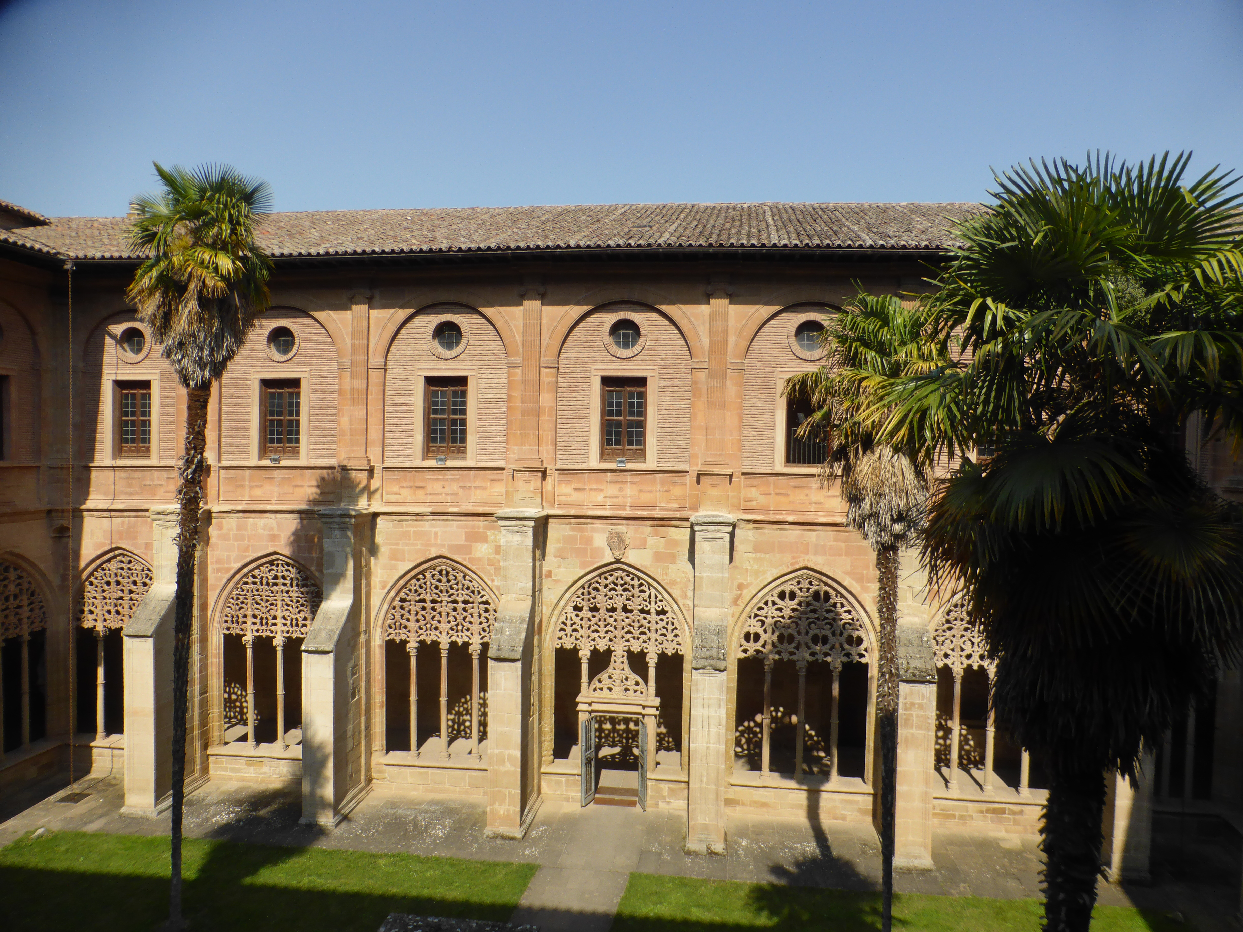 Vista desde el claustro superior.